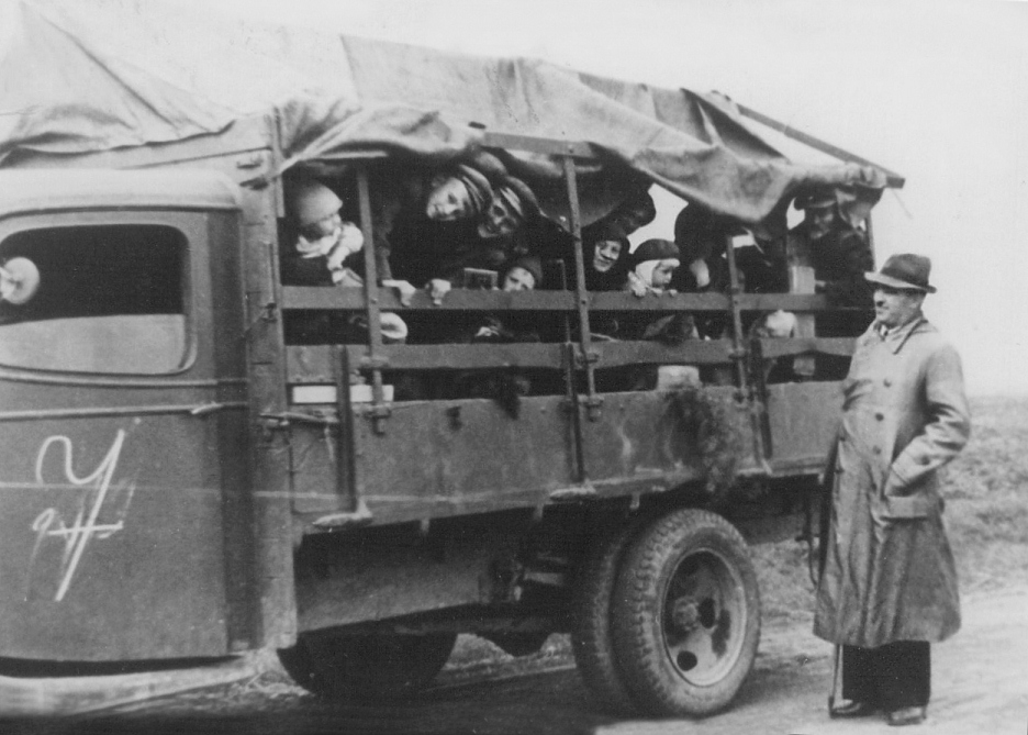 Abfahrt Bessarbiendeutscher Umsiedler aus Klöstitz